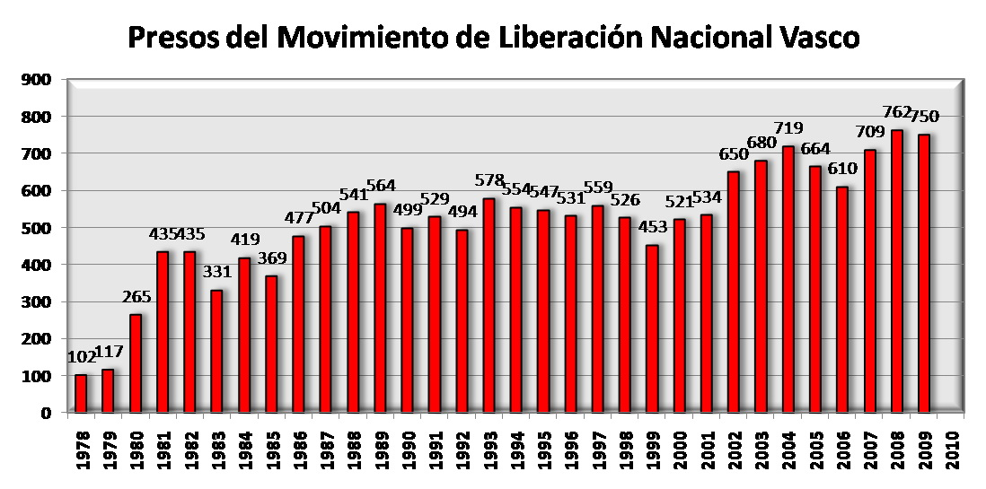 Evolución Presos del Movimiento de Liberación Nacional Vasco